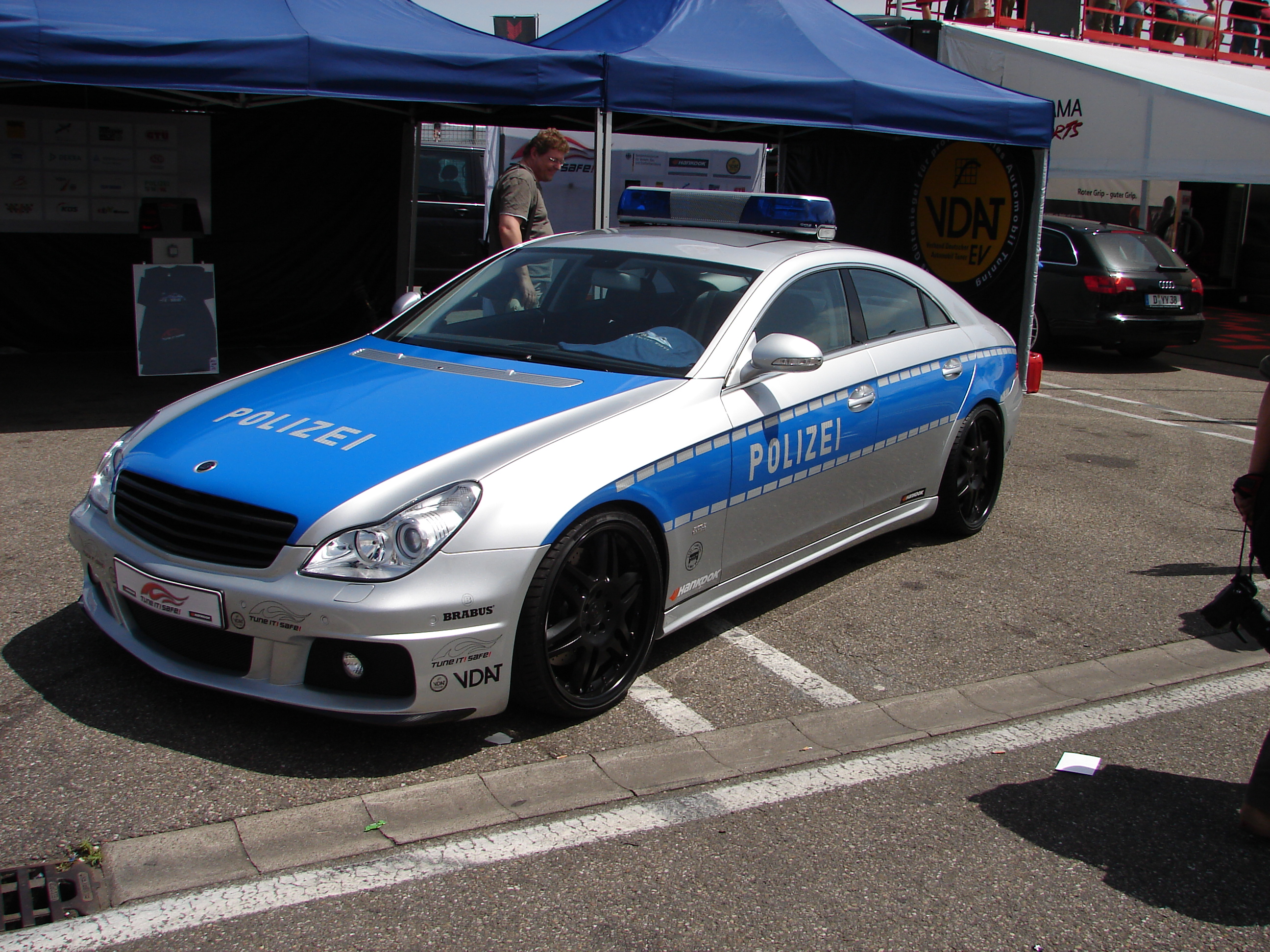 Brabus Rocket (Polizei-Version)